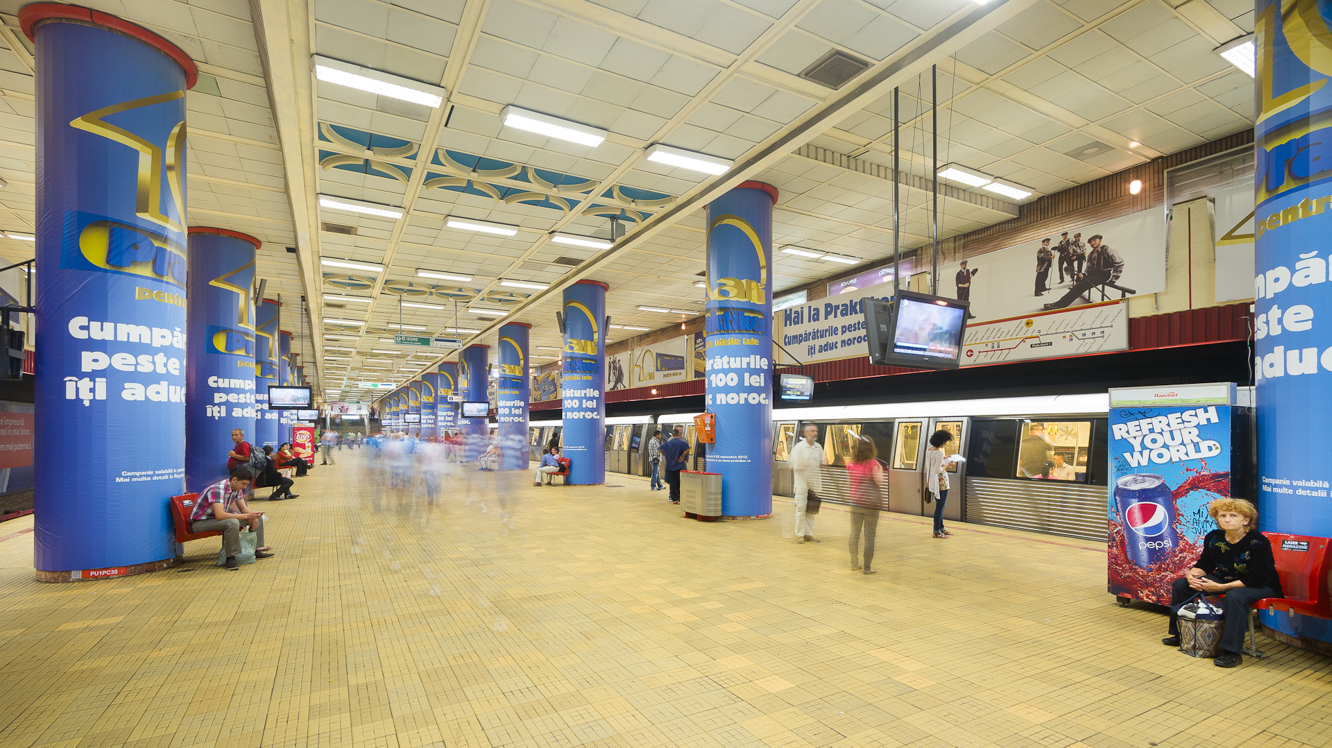 Statie Metrou - Piata Unirii, Bucuresti